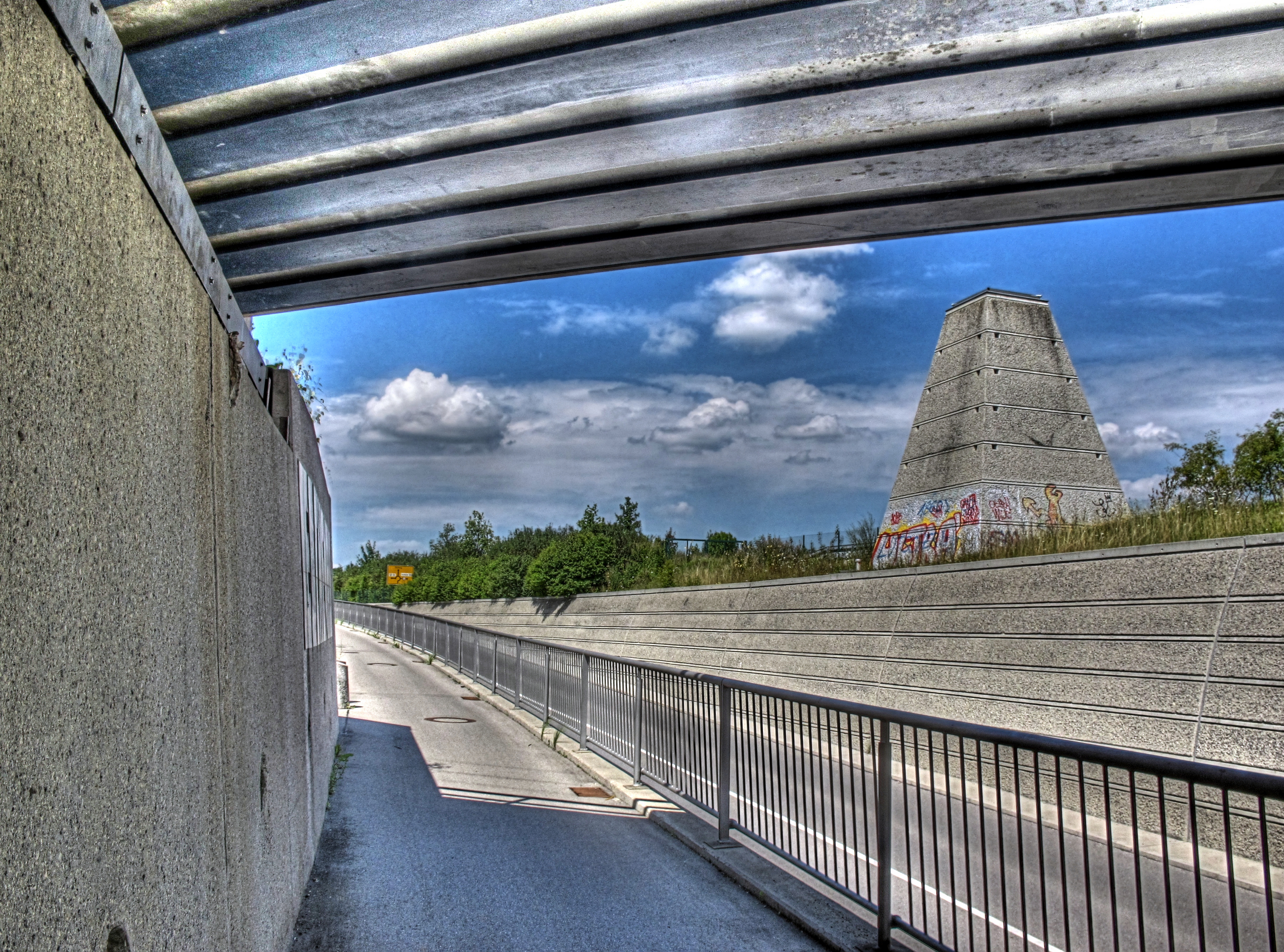 Deutschland, Bayern, Landkreis Fürstenfeldbruck, Gemeinde Eichenau, Straßen- und Radweg-Unterführung unter der S-Bahn Richtung Olching/Fürstenfeldbruck (HDR-Image)